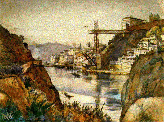 Ponte Luis I, Porto / Ponte de D. Luis. Em segundo plano a ponte pênsil.